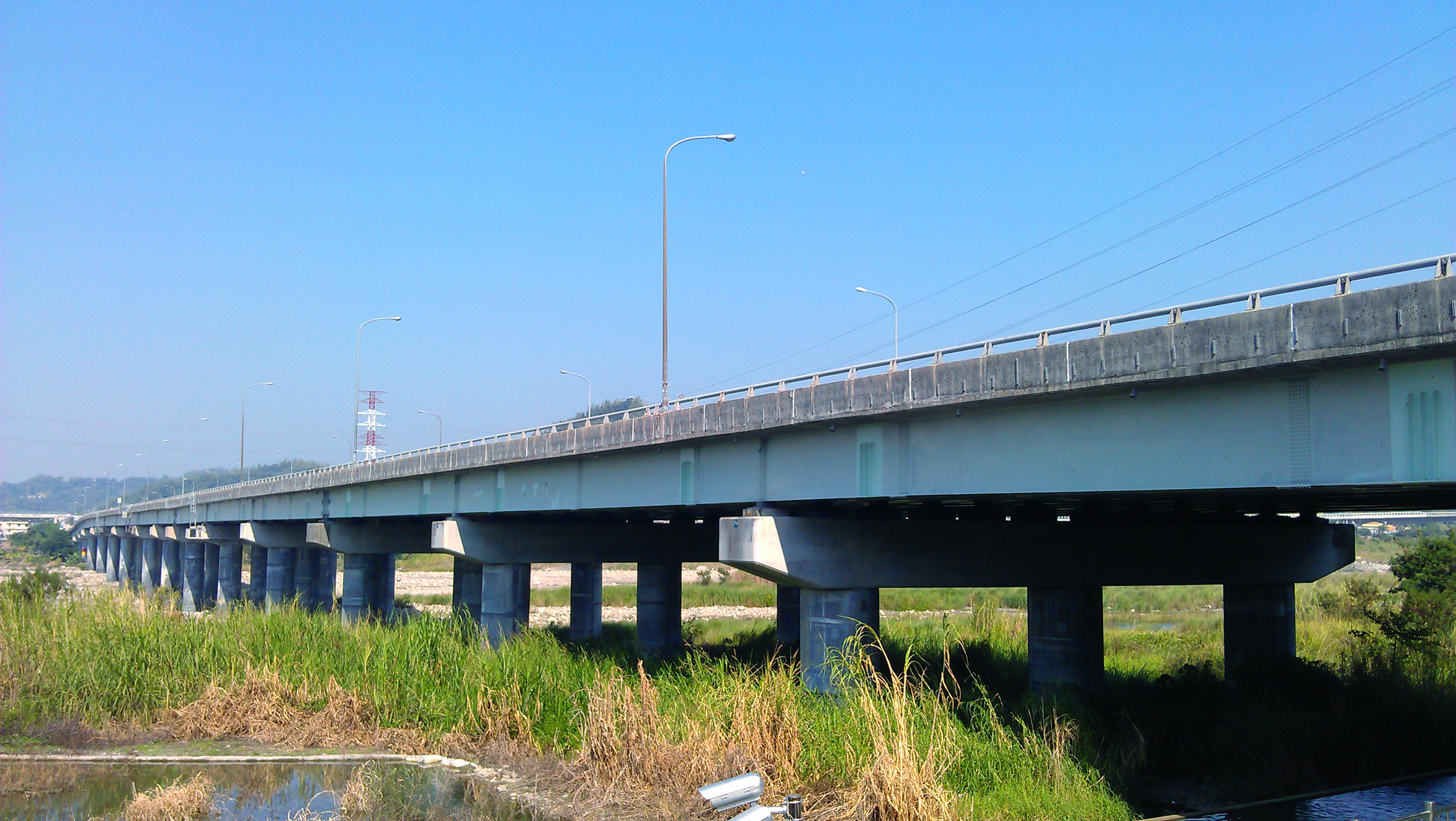 中文（台灣）: 台中烏溪大橋